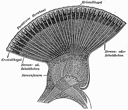 Abbildung aus Meyers Konversationslexikon 1888 - Facesttenauge einer Libelle